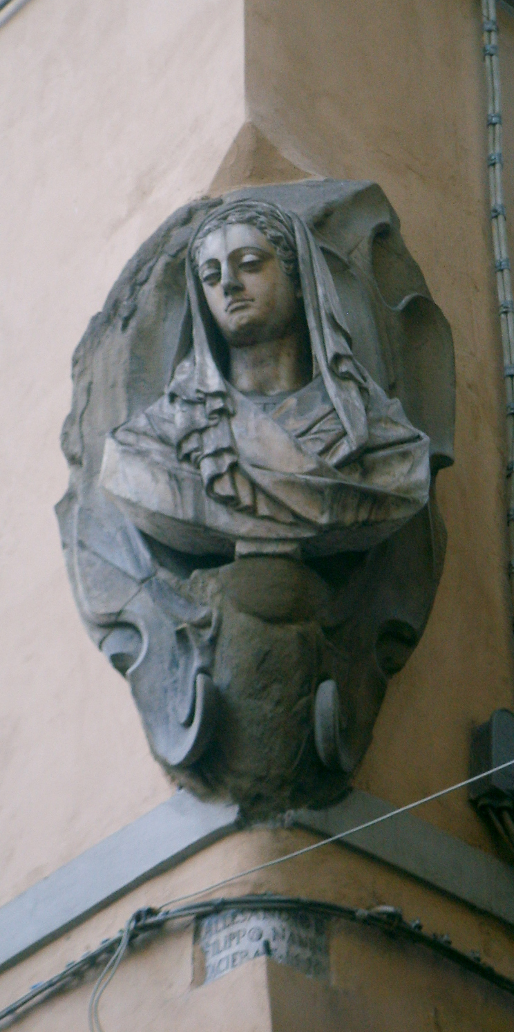 Piazza_San_Pierino in Florence, Italy